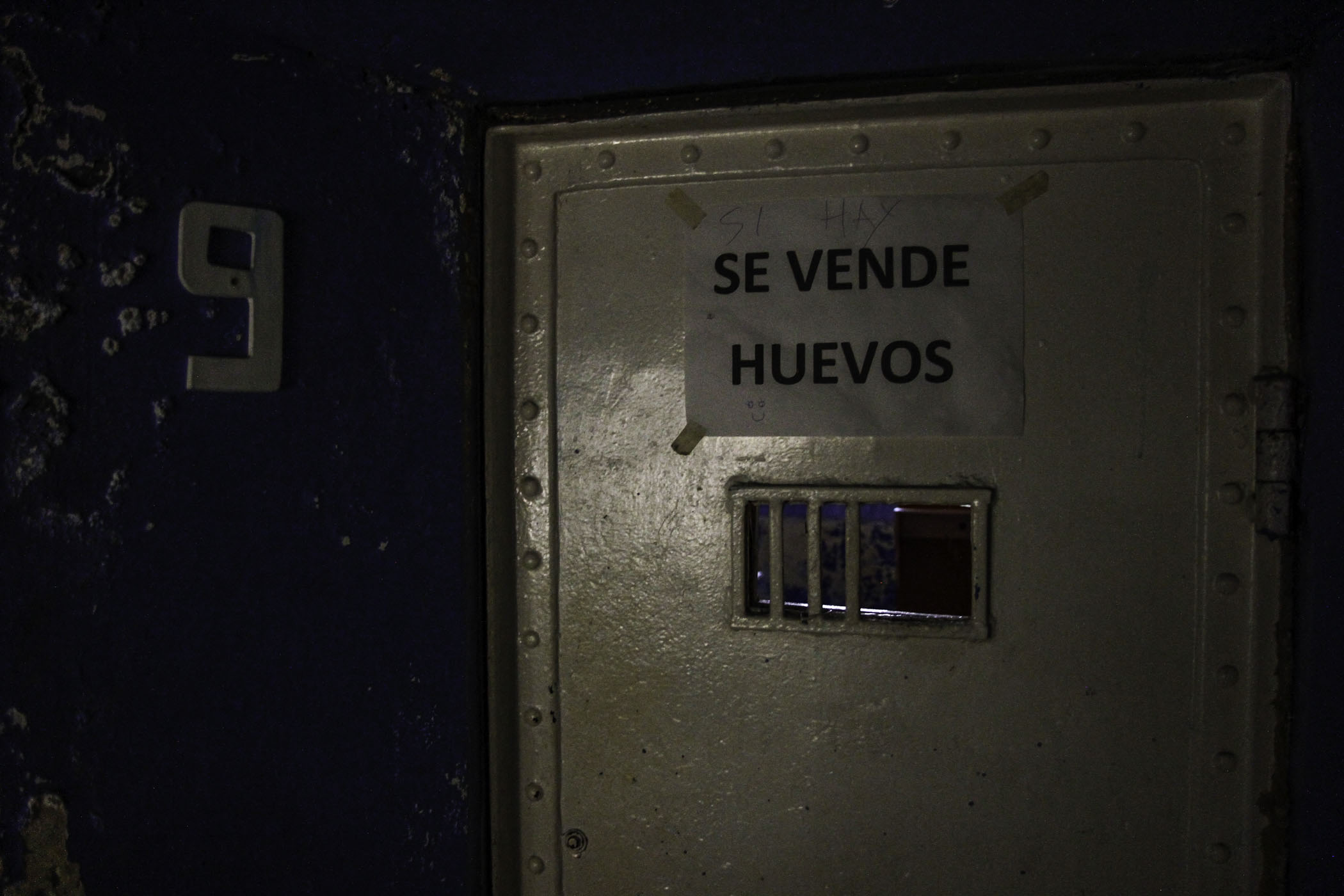 Quito, Ecuador, 20 dic (ANDES).- El Ministerio de Justicia, Derechos Humanos y Cultos presentó la exposición fotográfica "Espacios Verdes" cuyo escenario es el ex-Penal García Moreno. Esta exposición devela lo que dejaron las personas privadas de la libertad antes del cierre de este recinto carcelario. Foto: Micaela Ayala V./ANDES